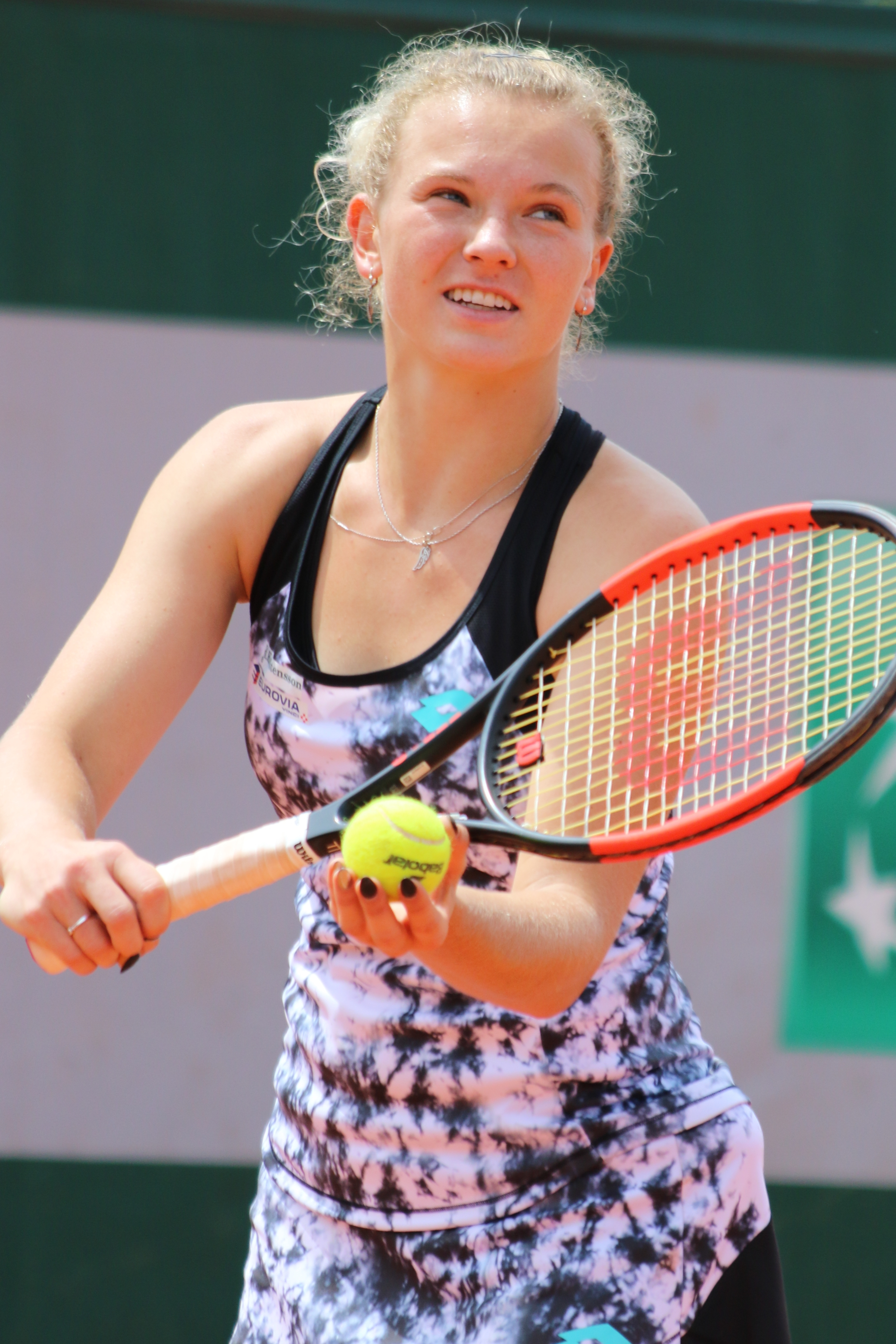 Siniakova RG18 (9)